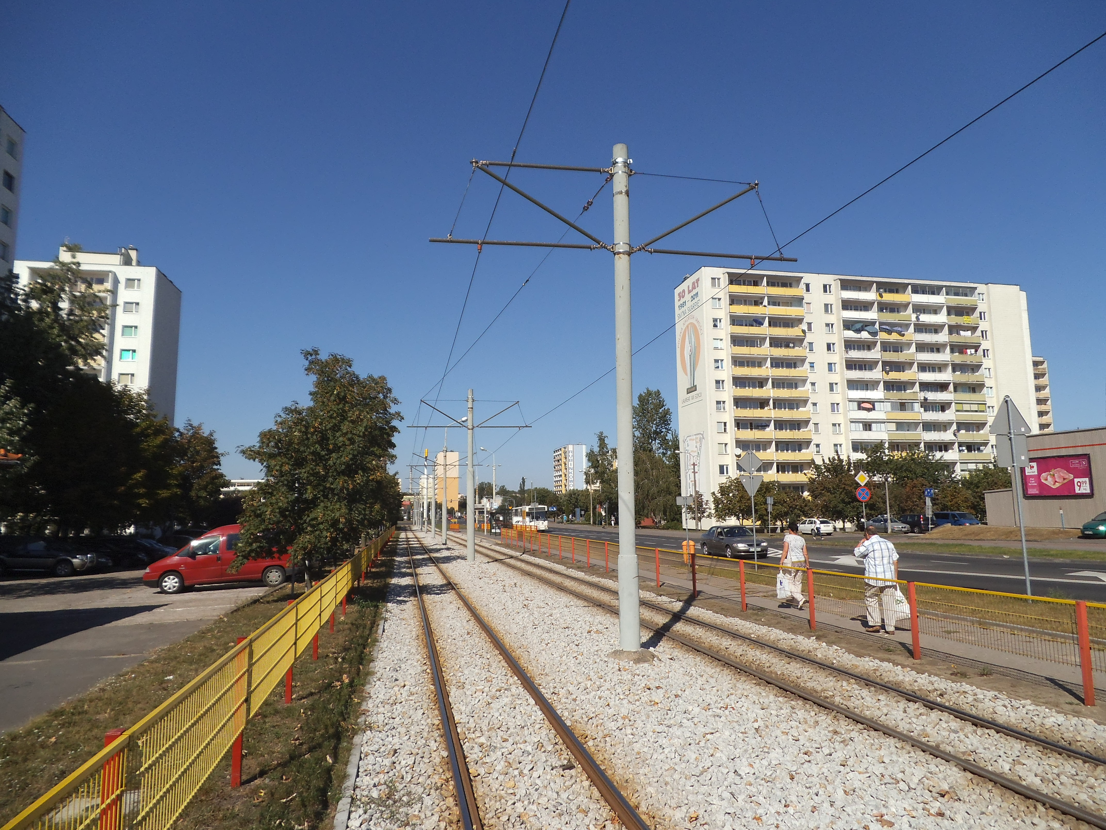 Torowisko tramwajowa przy ulicy Ślaskiego w Toruniu